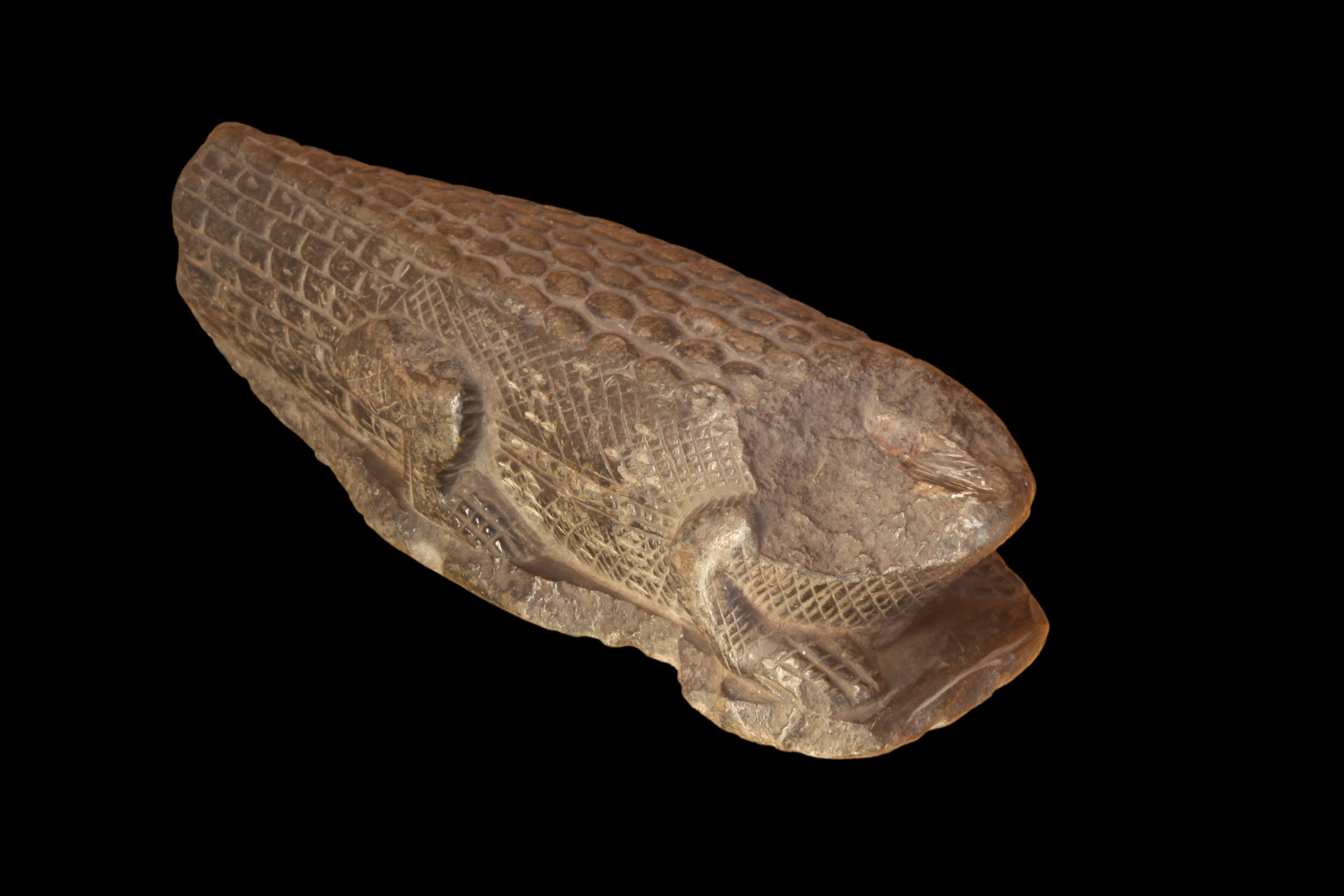 Crocodile